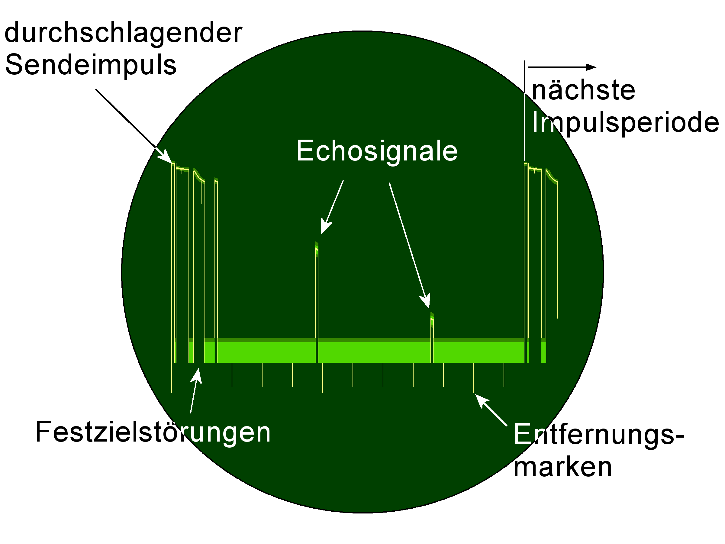 Radarschirm-ascope